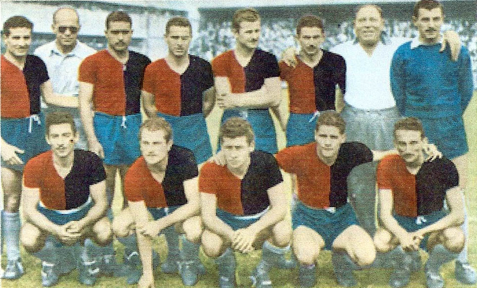 Newell's Old Boys 1949 campeones copa adrian escobar